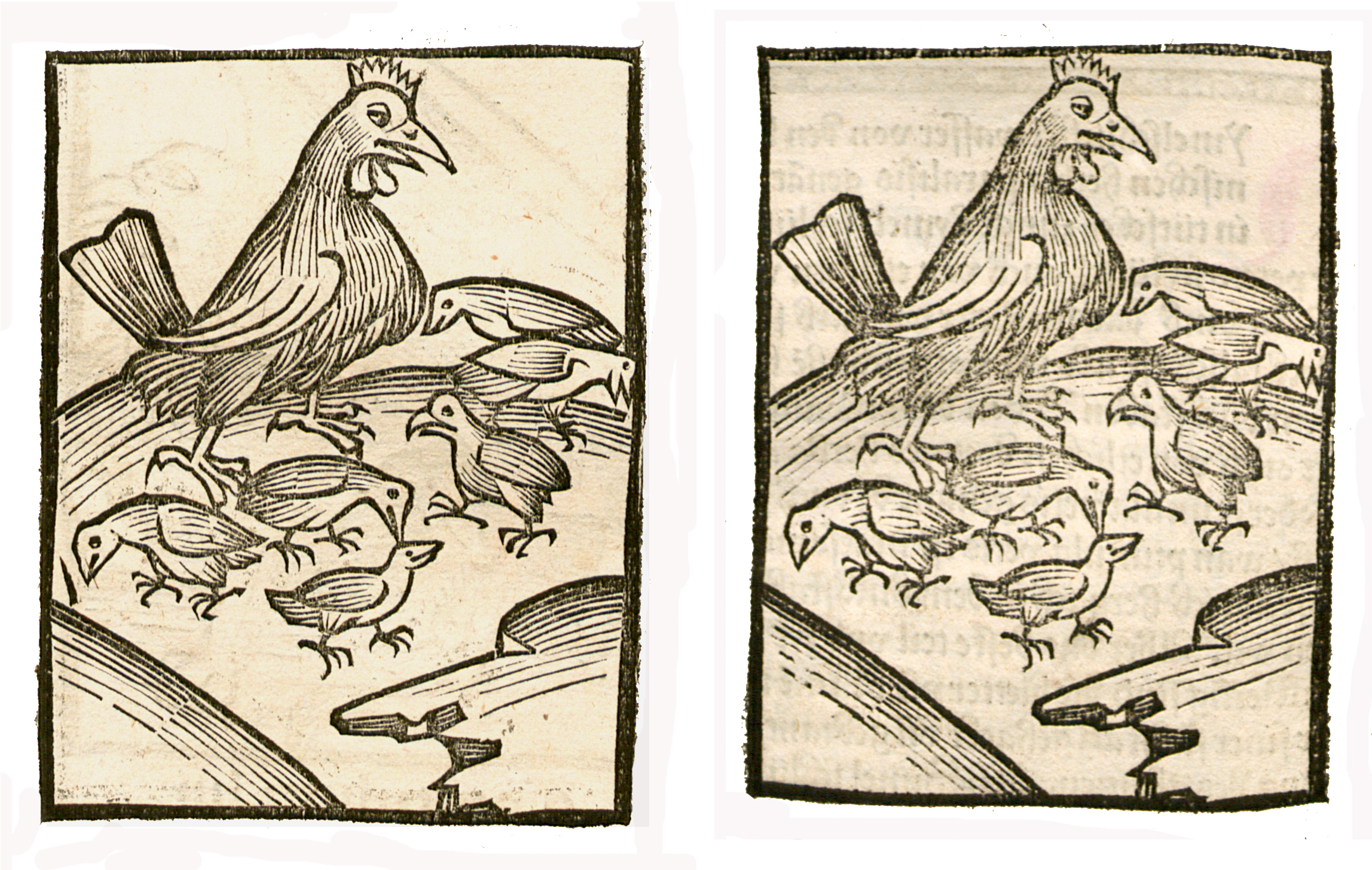 Abbildung von: Hoiner Magen (Gallina)